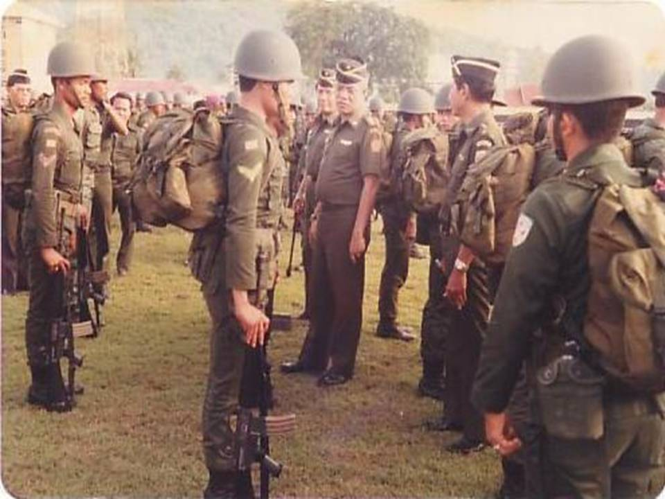 KUNJUNGAN